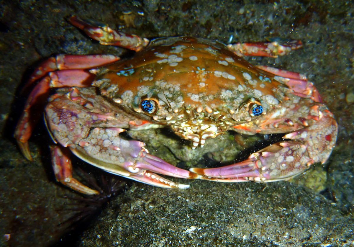 Un crabe Charybdis erythrodactyla à la Réunion.